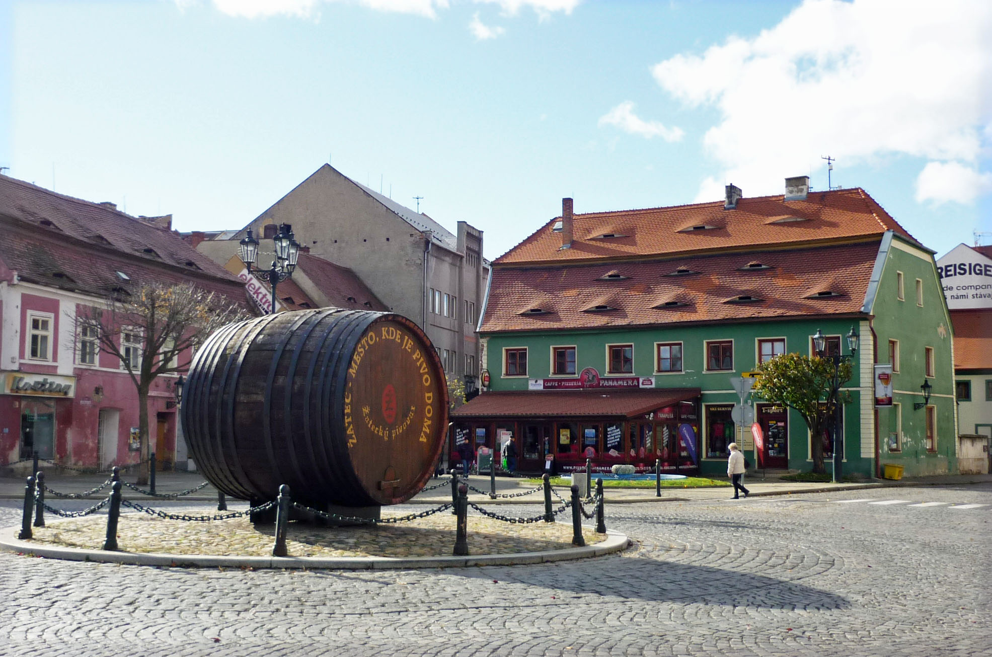 Kruhové náměstí in Saaz (Žatec)